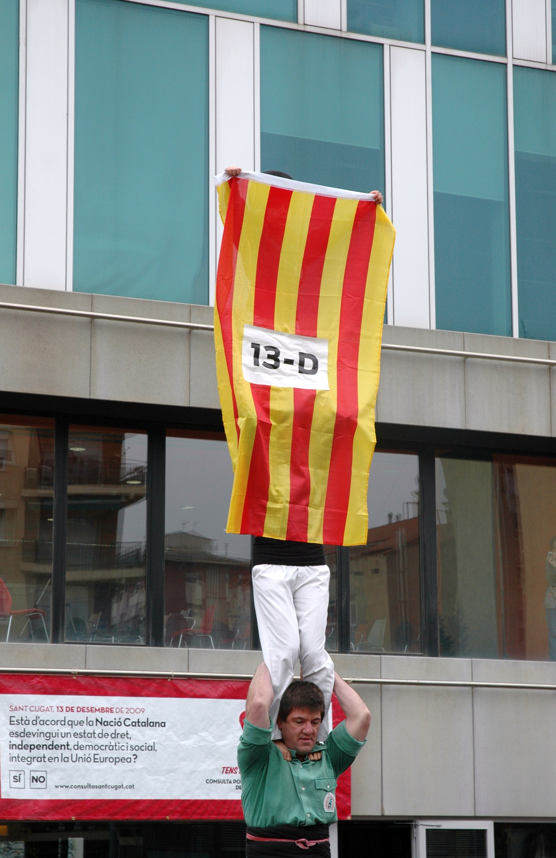 Sant Cugat - 13D - Castell